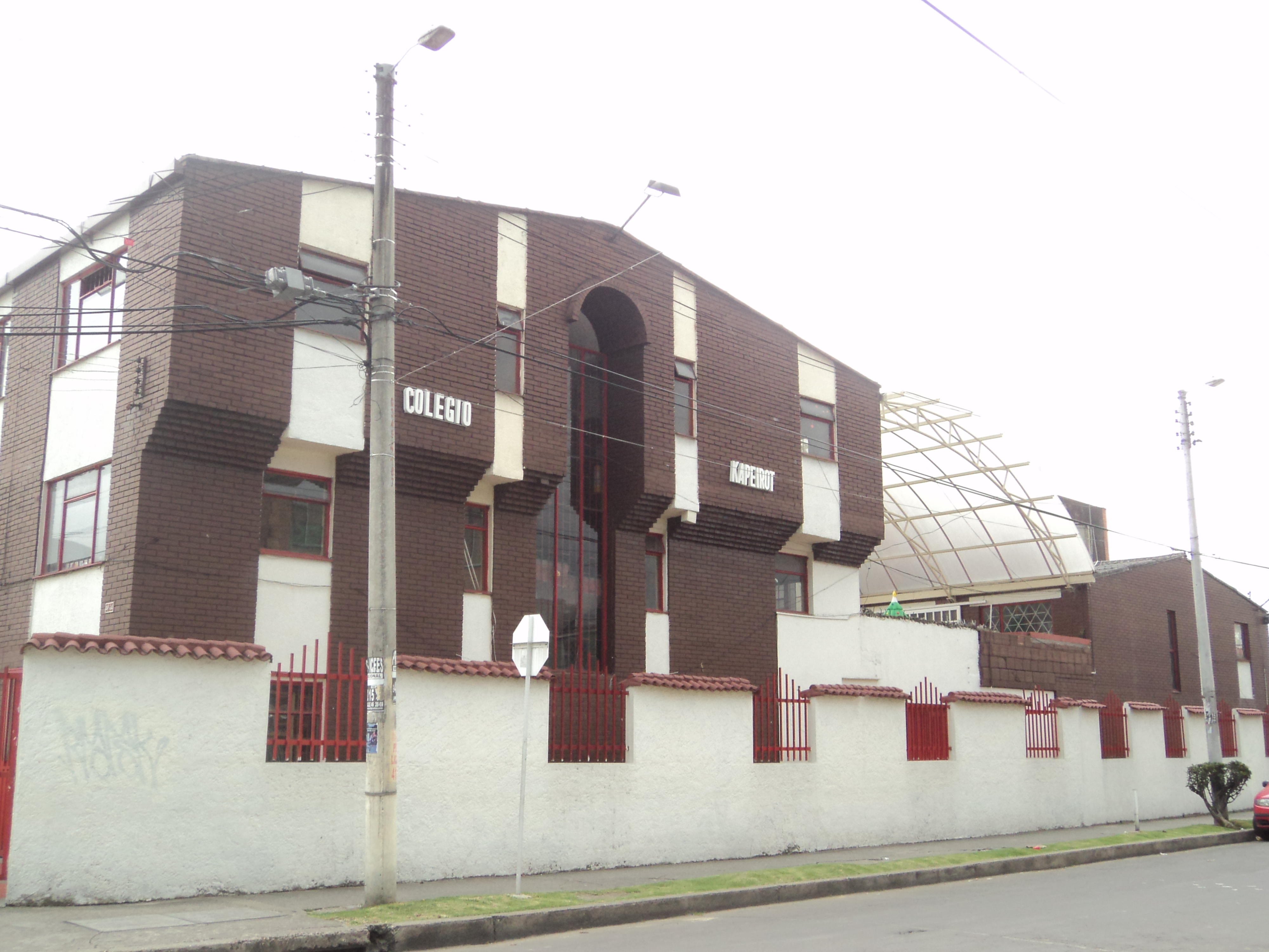 Colegio Kapeirot